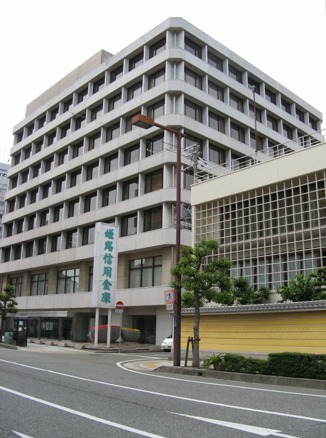 姫路信用金庫本店